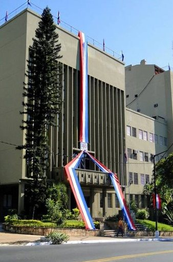 Sede del edificio del Ministerio de Defensa Nacional de Paraguay.